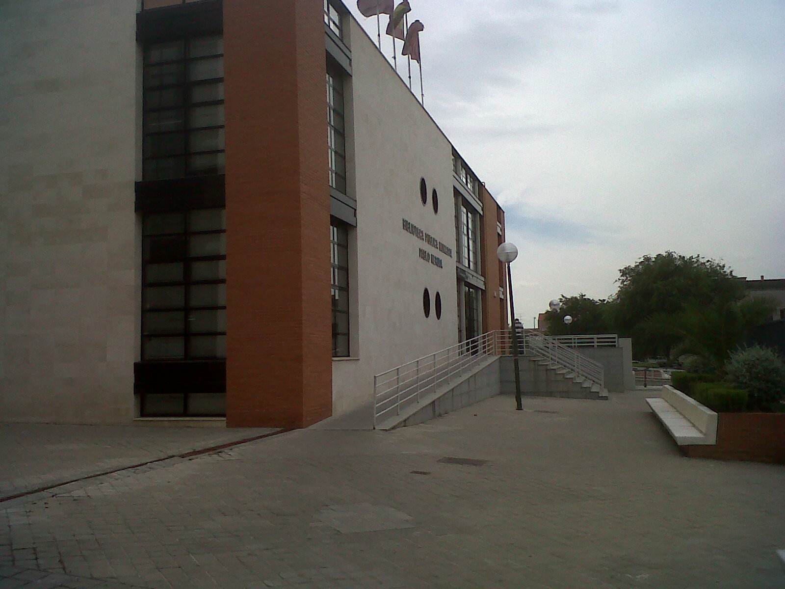 Biblioteca Pablo Neruda, Barrio Bilbao.